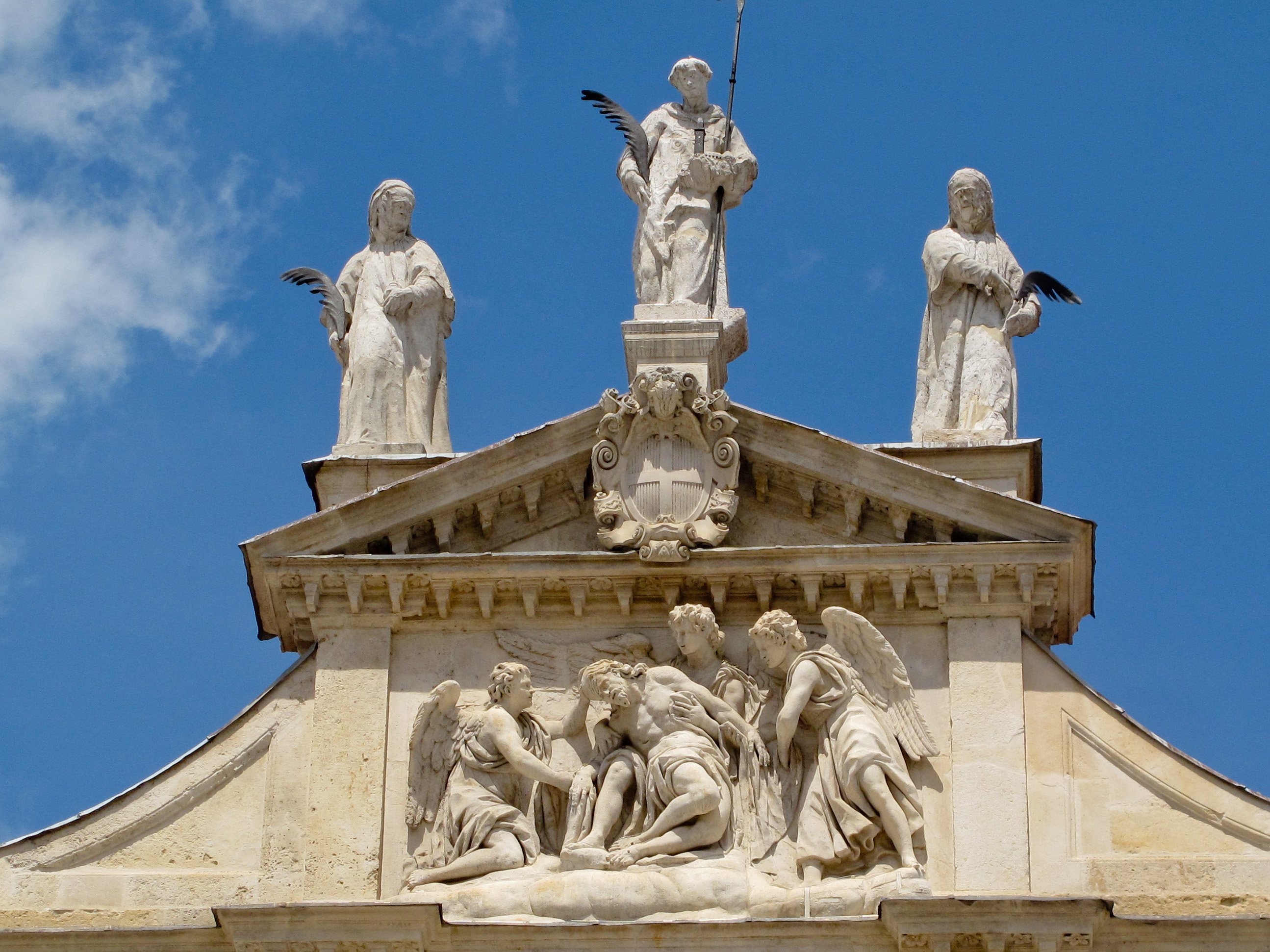 Vicenza - Chiesa di San Vincenzo - Fregio e statue di Albanese Giovanni Battista Albanese (1573–1630) Description Italian sculptor and architect Date of birth/death15731630Location of birth/deathVicenzaVicenzaWork locationVeneto (Italy)Authority control VIAF: 74726494 ULAN: 500083441